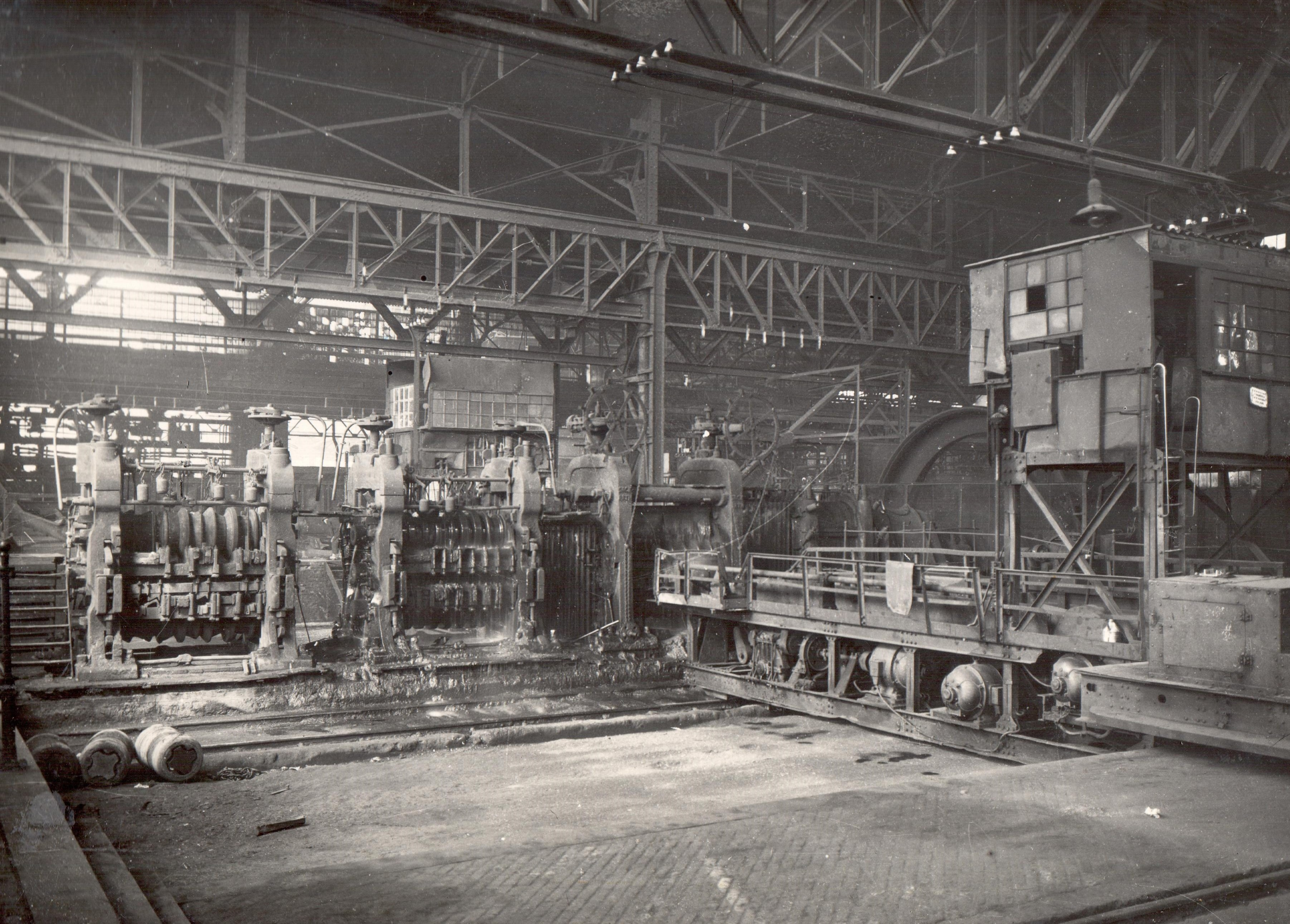 Walcownia średnia huty "Pokój" w Rudzie Śląskiej, lata 20. XX wieku